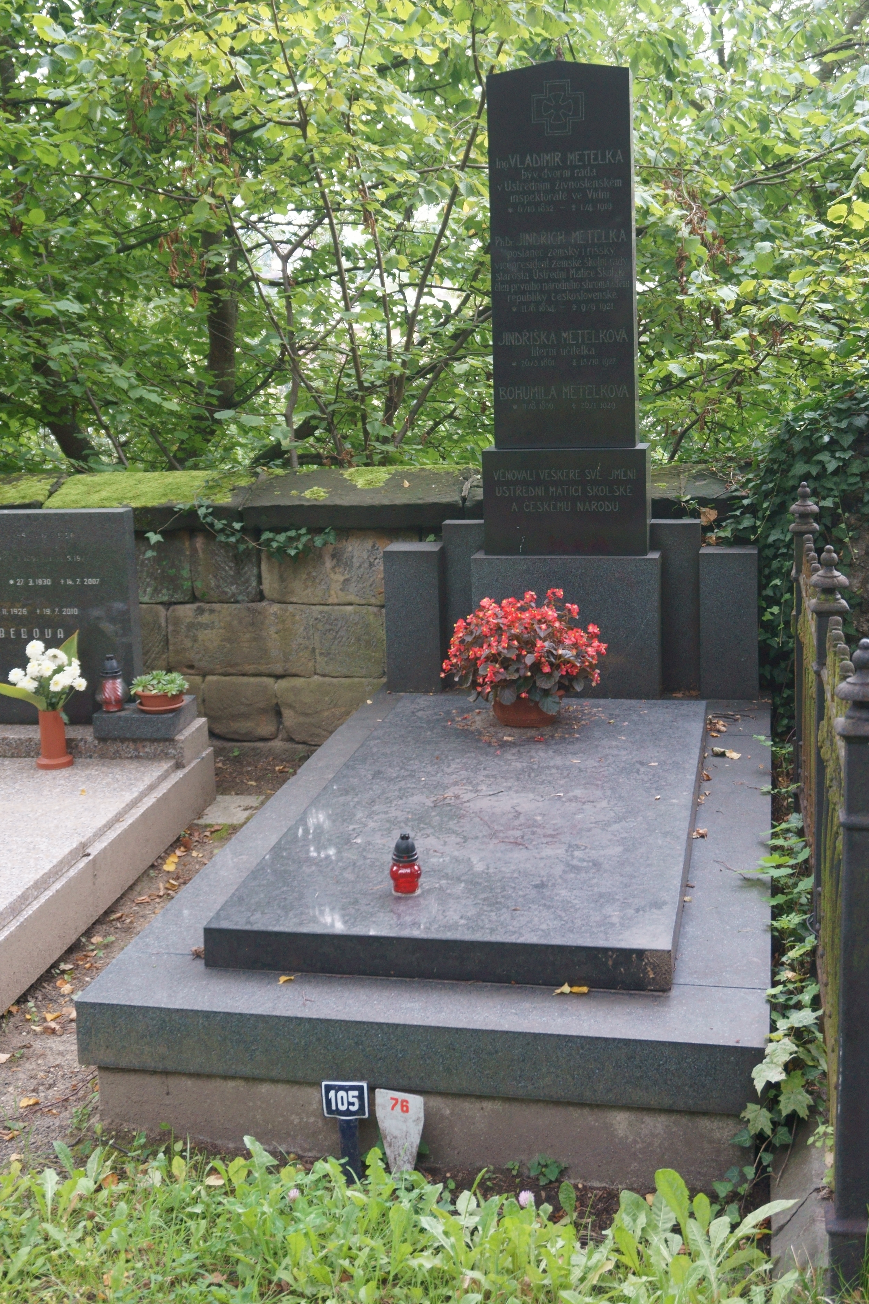 Turnov, hřbitov, Jindřich Metelka